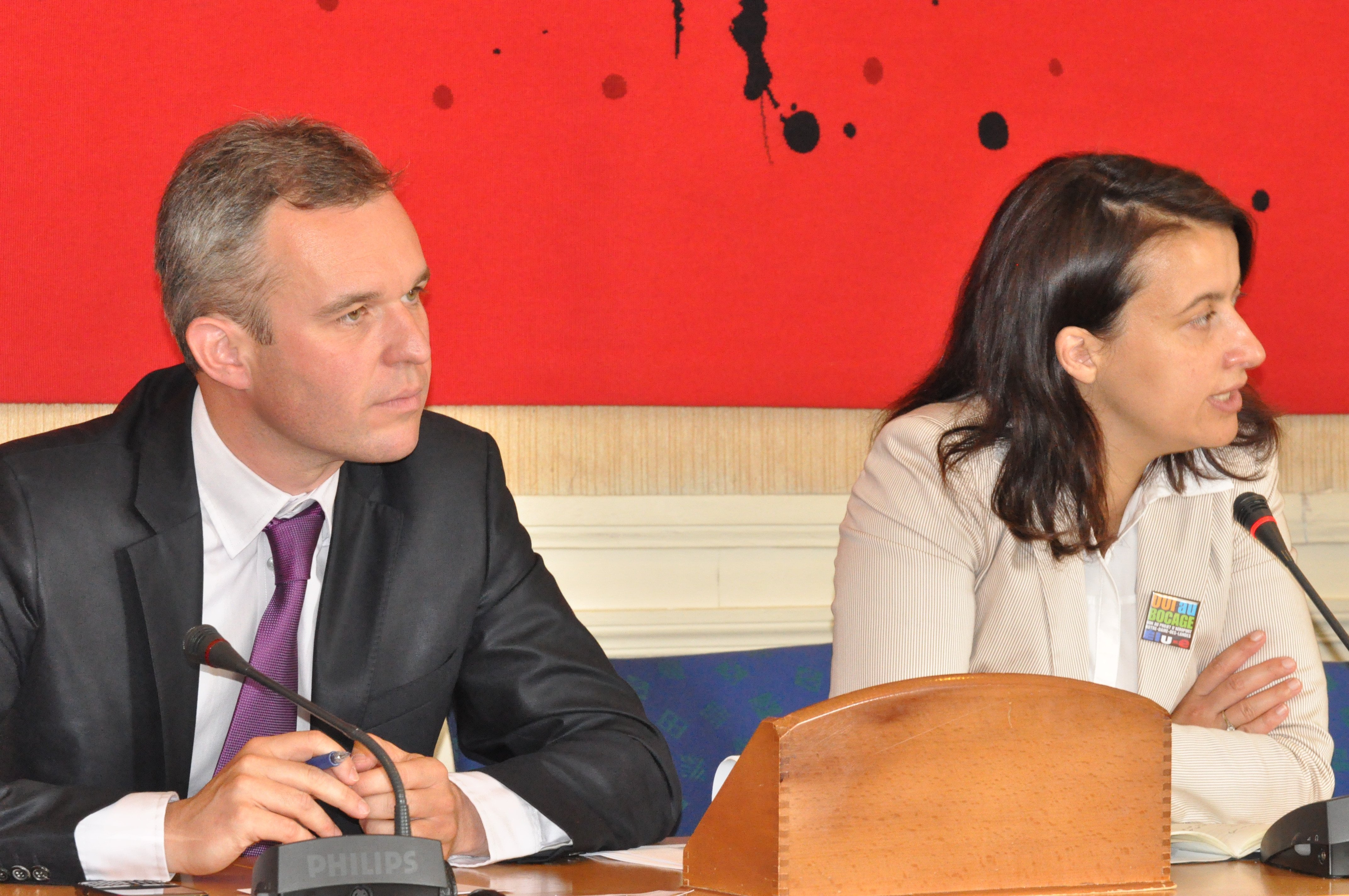 François de Rugy et Cécile Duflot, le 8 septembre 2008.